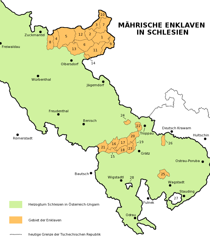 Enclaves of Moravia in Silesia (1783-1918). Description in German. Die Landkarte bietet den Überblick über die Gemeinden, die Enklaven Mährens in Schlesien (Österreichisch Schlesien bzw. Preußisch Schlesien) waren. Die Nummern bezeichnen diese Gemeinden (in Klammern sind ehemalige unabhängige Gemeinden genannt, heute Teile anderer Gemeinden): 1 - Füllstein (mit Grundek, Karlsdorf, Kaschnitzberg, Schärfenberg), 2 - Maidelberg (mit Zottig, Seitendorf), 3 - Glemkau, 4 - Johannesthal, 5 - Hennersdorf, 6 - Liebenthal (mit Butschafka, Ober Paulowitz), 7 - Hotzenplotz (mit Stubendorf), 8 - Petersdorf, 9 - Rausen (mit Grosse, Matzdorf), 10 - Deutsch Paulowitz, 11 - Roßwald (mit Kawarn, Neuwald, Weine), 12 - Waißak (mit Bartelsdorf, Pittarn), 13 - Peischdorf (heute Teil von Olbersdorf), 14 - Röwersdorf, 15 - Öhlhütten, 16 - Leitersdorf (mit Choltitz), 17 - Schönstein (mit Hertitz), 18 - Niklowitz, 19 - Köhlersdorf, 20 - Schlakau, 21 - Dorfteschen (heute Teil von Eckersdorf), 22 - Jaktar (heute Teil von Troppau), 23 - Stablowitz, 24 - Wlastowitz, 25 - Schlatten (mit Ohrad, heute Teil von Wagstadt, und mit Karlowitz, heute Teil von Zeiske), 26 - Sucholasetz und Hadrunek (heute Teil von Troppau). Zu den Enklaven gehörten nicht: 27 - Botenwald, 28 - Neu Würben.